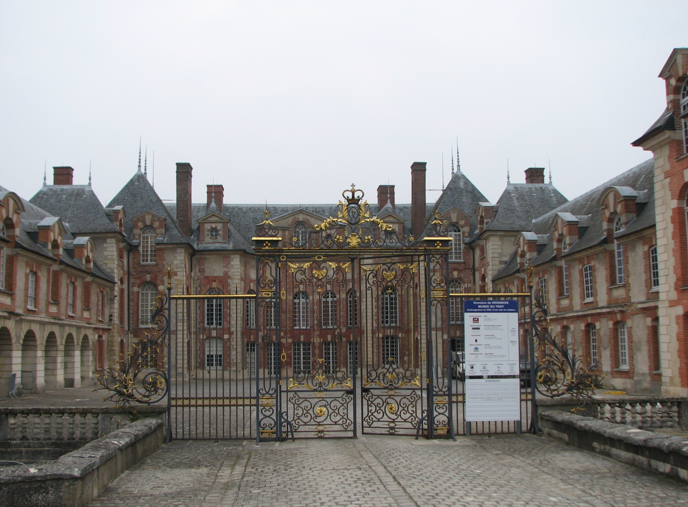 Château de Grosbois, Val-De-Marne.